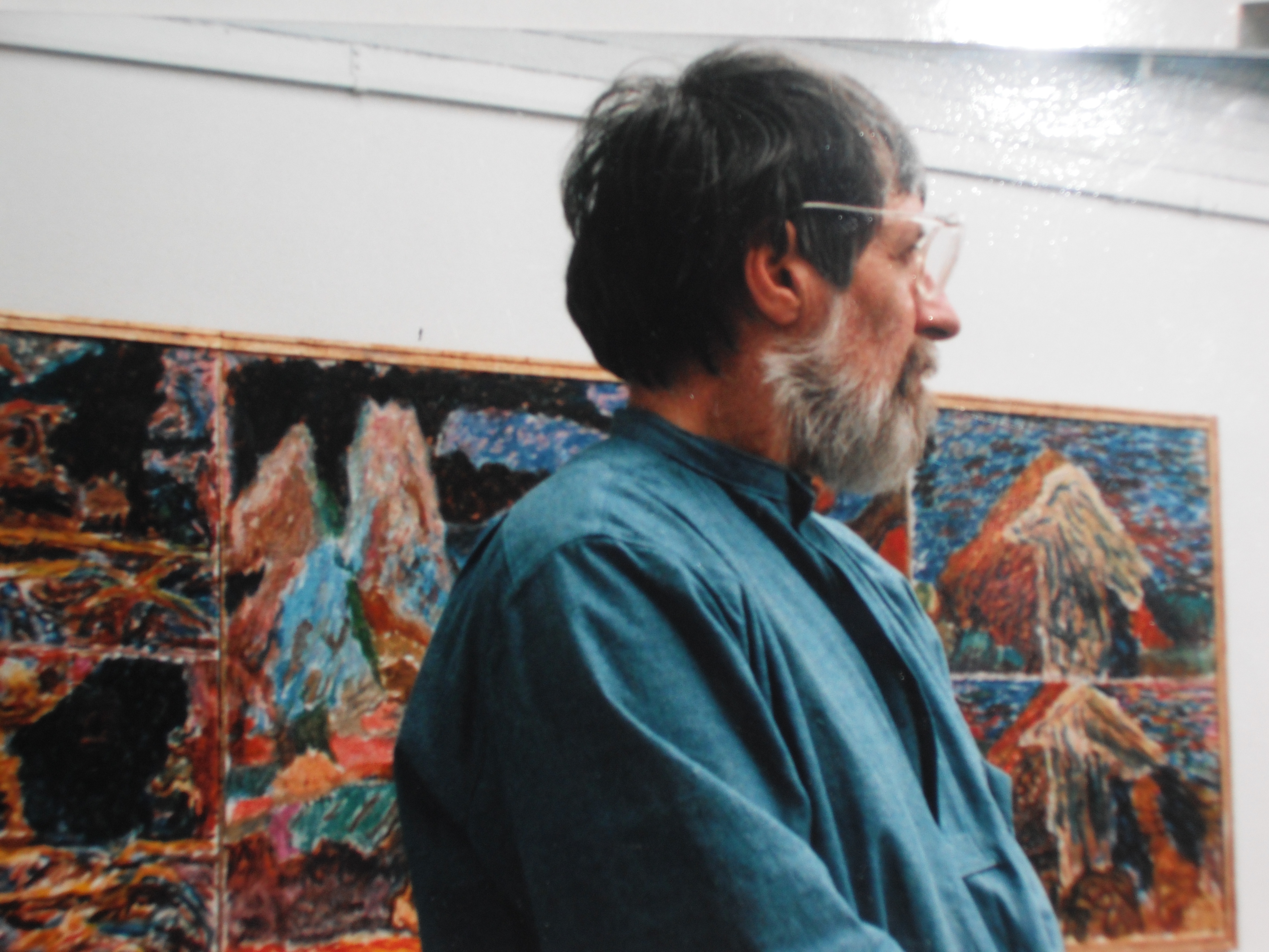 Henry Larsen på Den Frie 1986